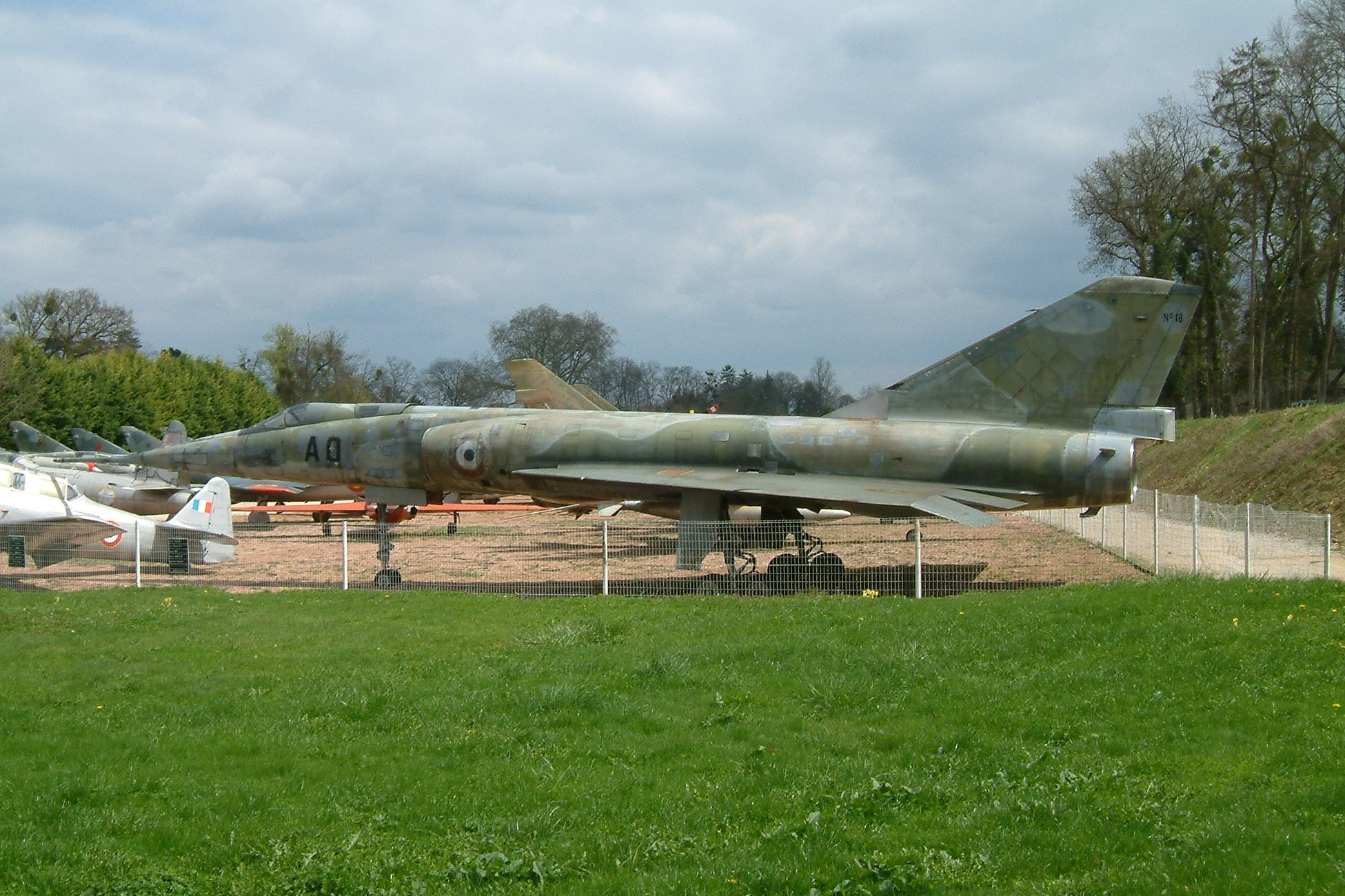 Mirage IV conservé au musée du Château de Savigny-lès-Beaune, Bourgogne, FRANCE